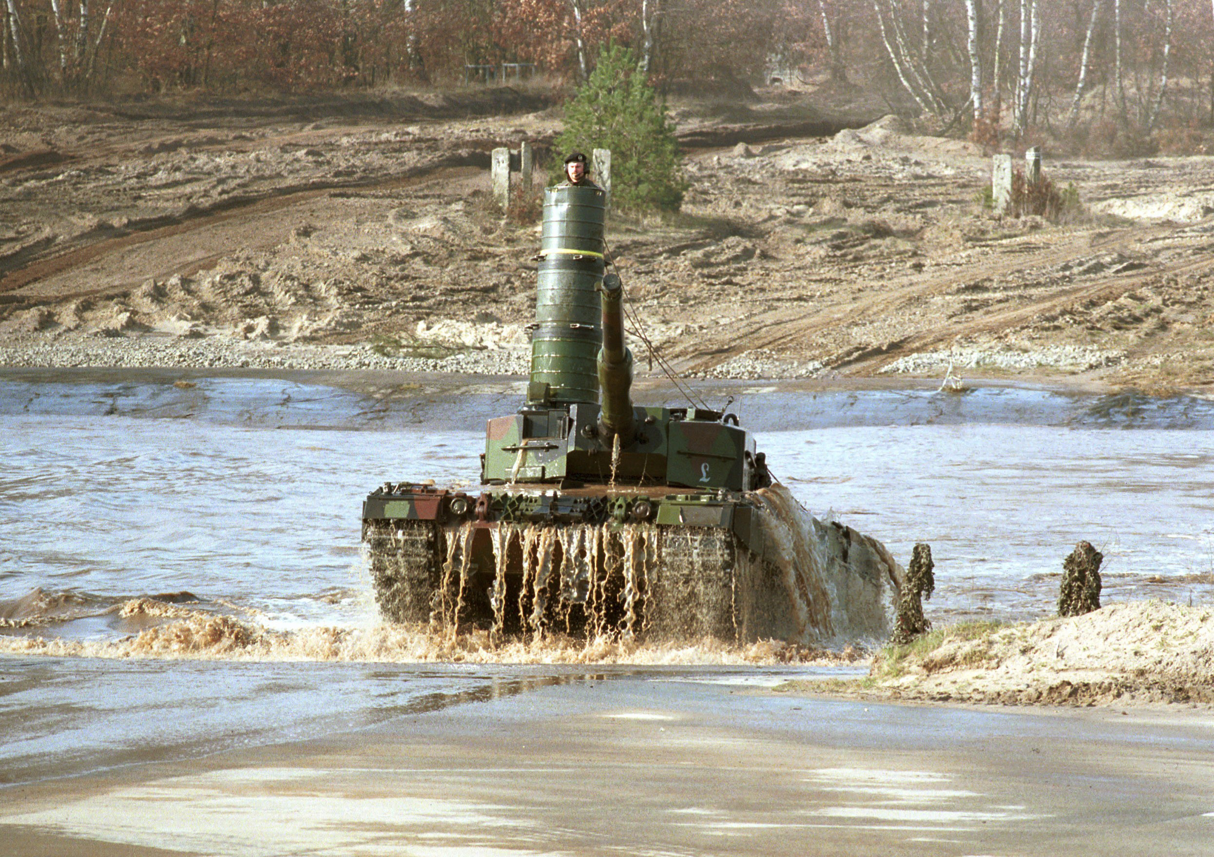 Kampfpanzer Leopard 2 A4 mit aufgesetztem Tauchschacht durchquert ein Gewässer auf dem Truppenübungsplatz. Mit diesem Tauchschacht ist der Leopard bis zu einer Tiefe von 4 Metern unterwassserfahrfähig. ©Bundeswehr/Modes